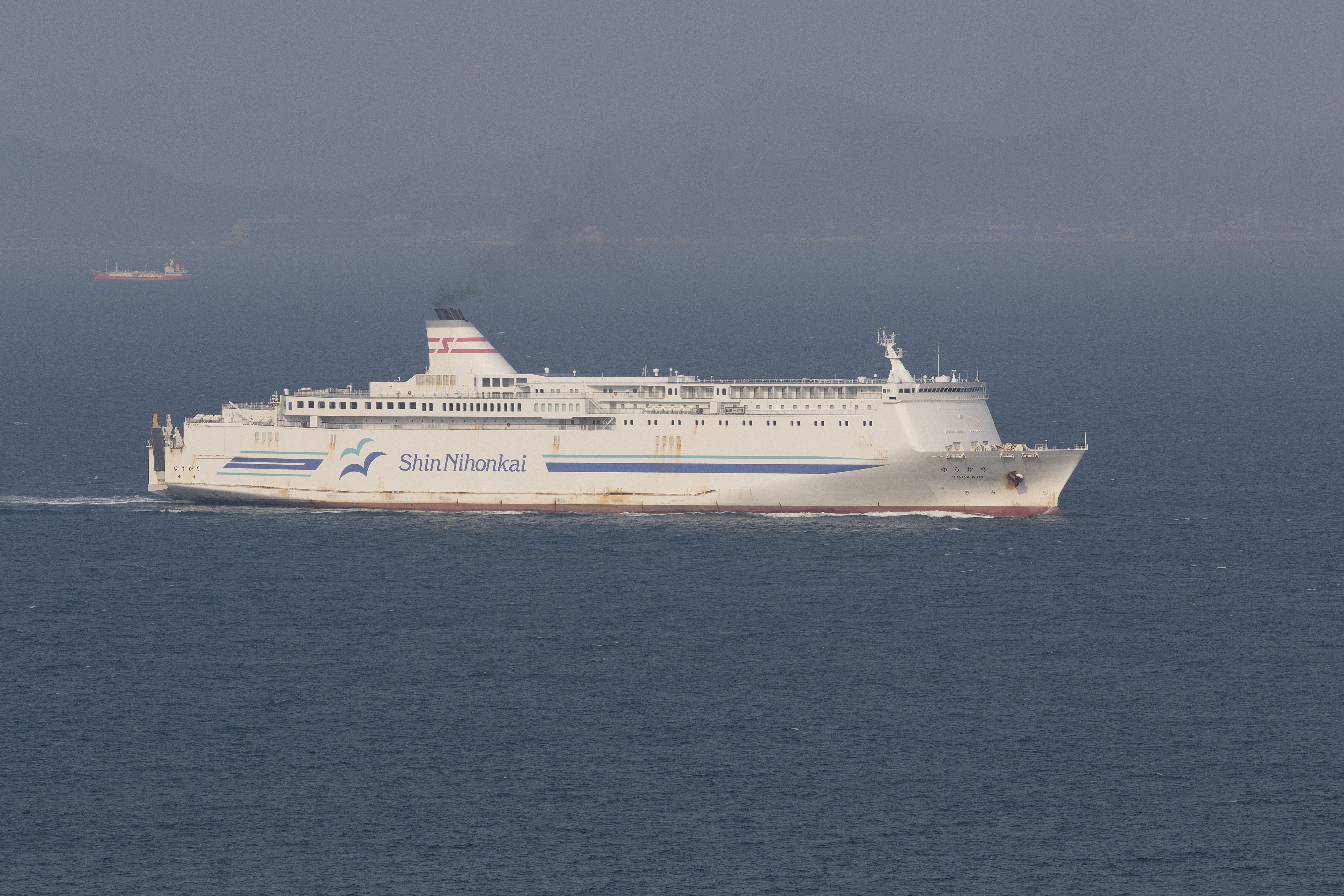 新日本海フェリー ゆうかり （瀬戸内海 坂出市沖）